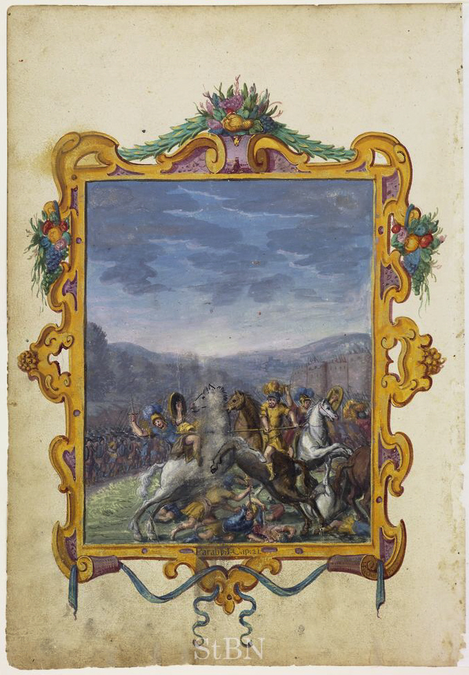 Kampf Israels gegen die Philister (1. Chronik 20) Künstler: Hieronymus Franz Fuchs Transkription und weitere Informationen